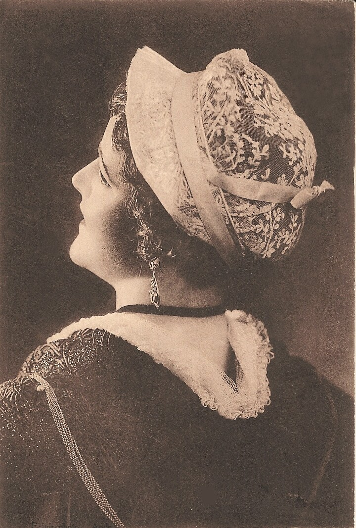 Le sarret, coiffe traditionnelle des Agathoises